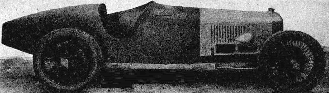 La Delage GP de 1924